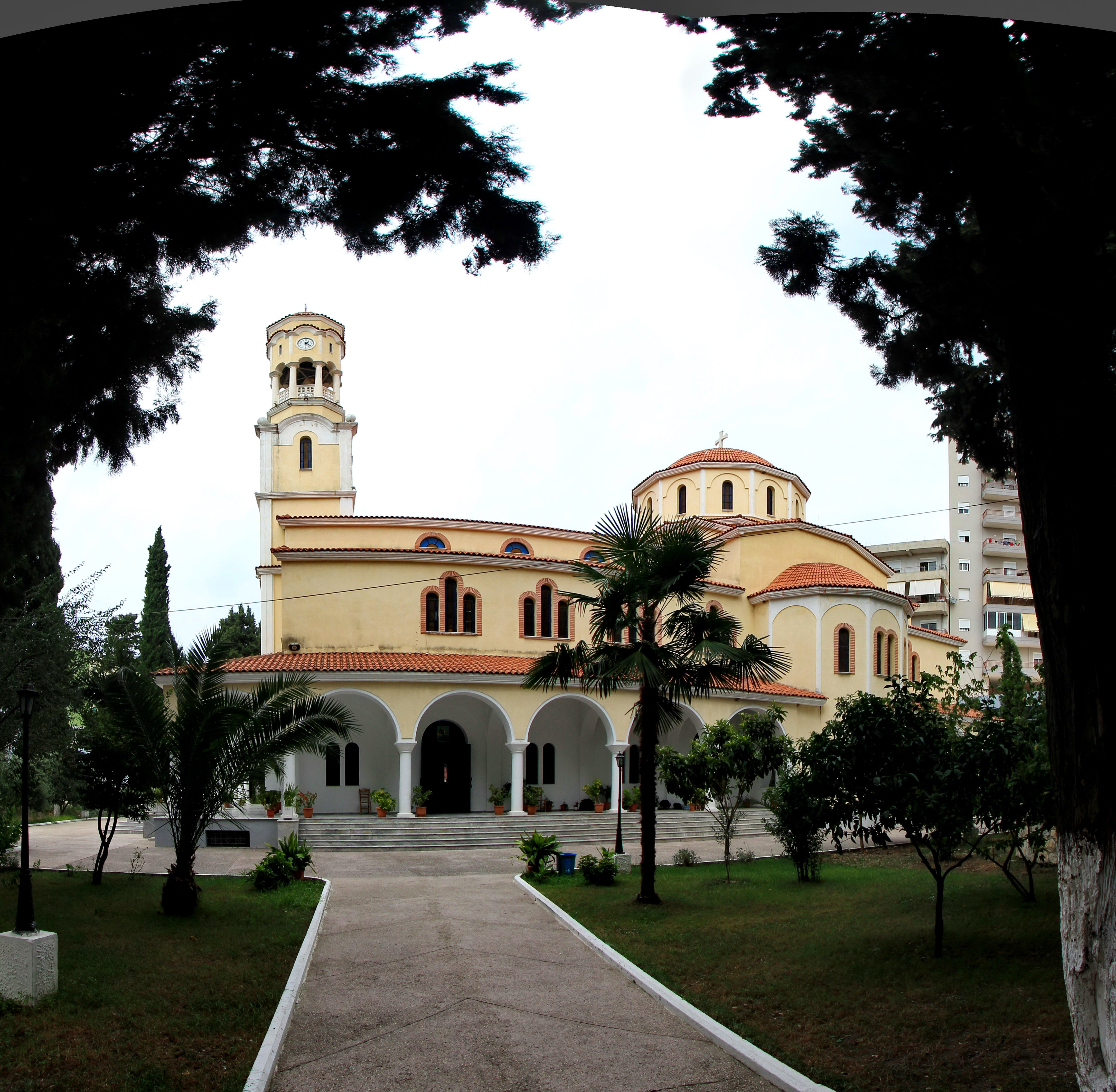 Kisha e Shen Gjergjit (Strumë)